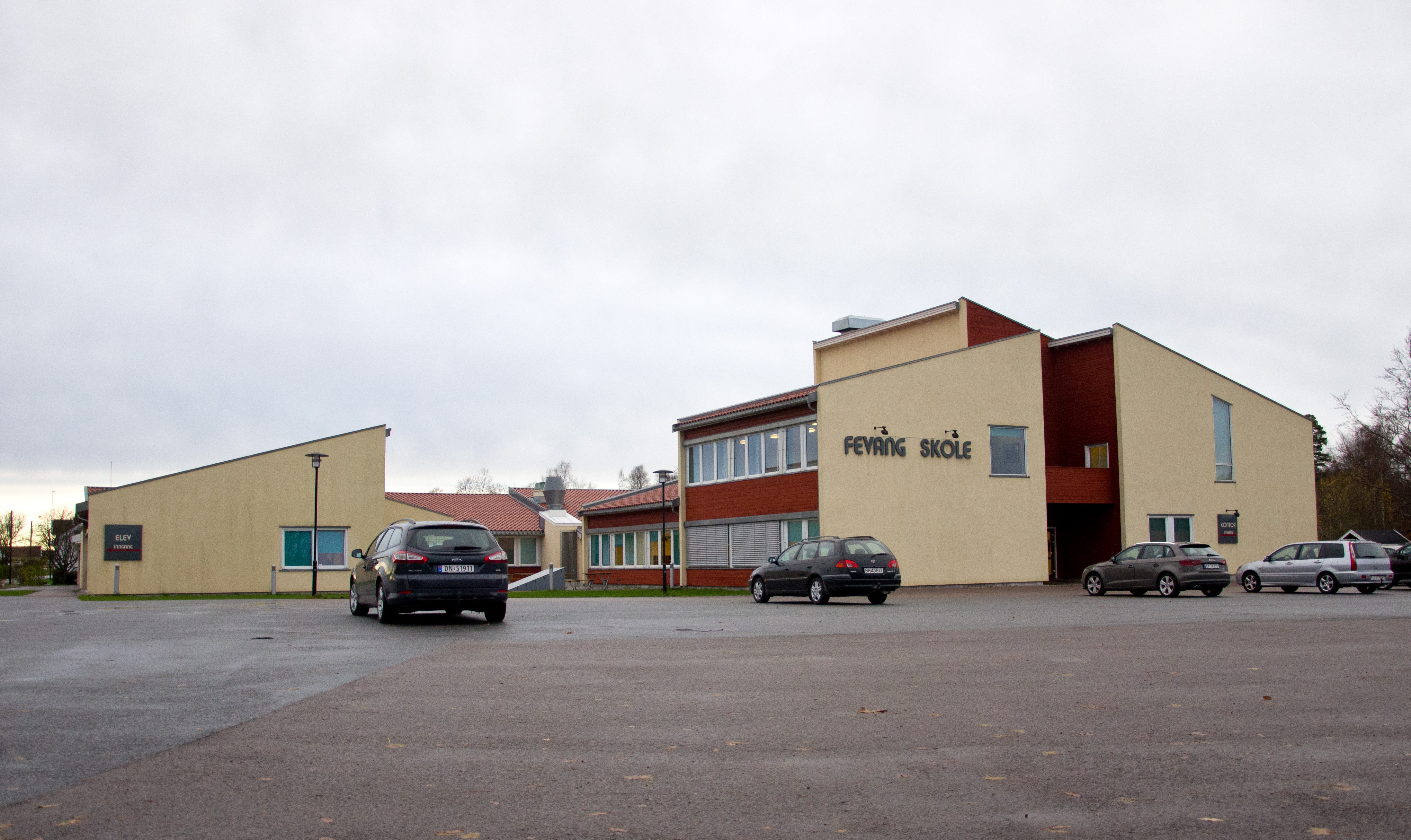 Fevang skole, Sandefjord